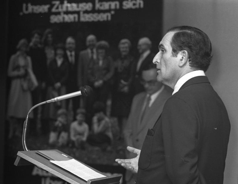 Staatssekretär Dietrich Spangenberg eröffnet die Ausstellun über Zonenrandförderung "Unser Zuhause kann sich sehen lassen" im Haus der Evangelischen Kirche, Adenauer Allee 37.